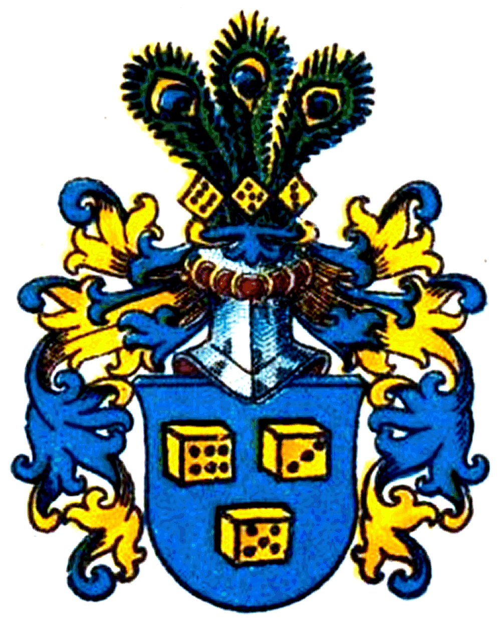 Wappen derer von Billderbeck